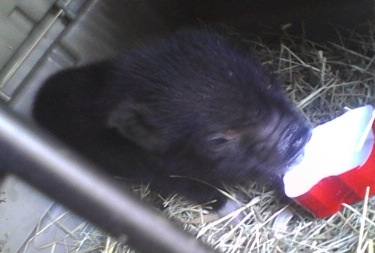 Teacup pig